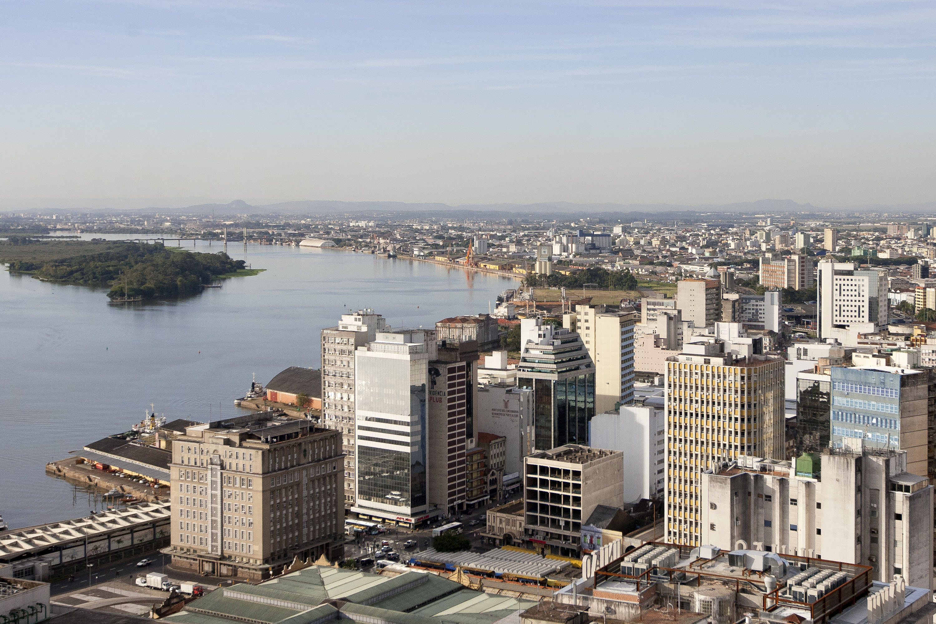 Foto feita do alto do prédio Santa Cruz, na Rua da Praia, Centro da cidade. Porto Alegre, RS - 01/06/2012 Foto: Bruna Cabrera